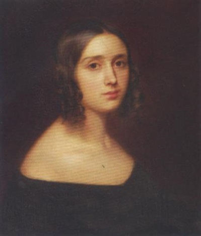 Brustportrait einer jungen Frau